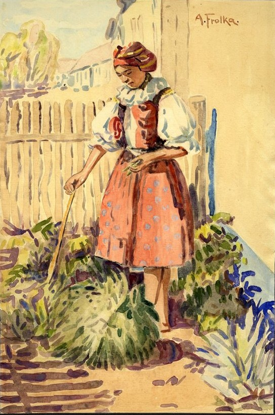 Česky: Krojovaná dívka při práci na zahradě